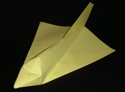 Papierflieger nach Takuo Toda 1999?